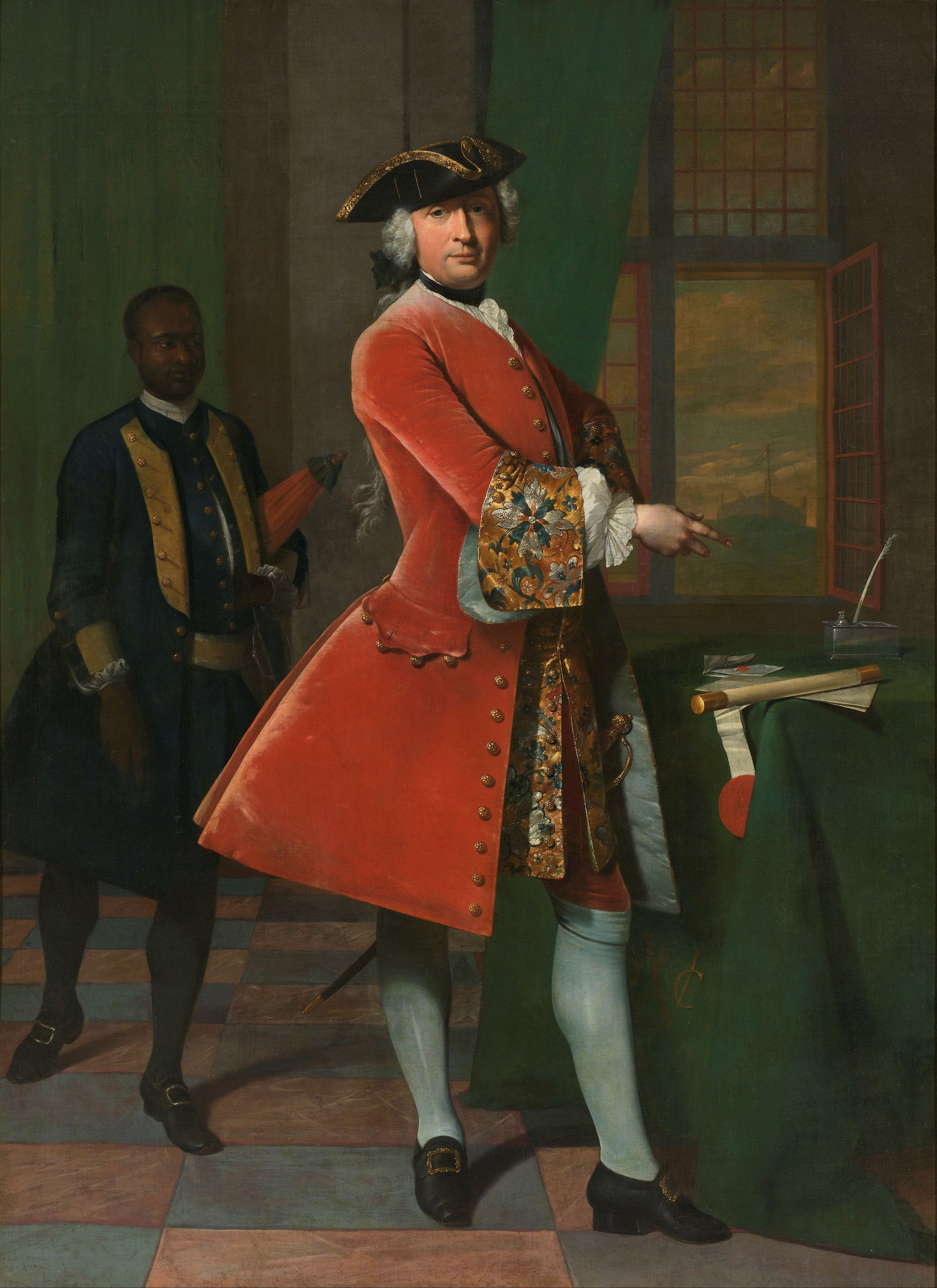 Portret van Jan Pranger, directeur-generaal van de Guineesche Goudkust. Pendant van SK-A-2249. Staande, ten voeten uit, bij een tafel waarop enkele documenten en een inktstel staan. Achter de man een zwarte man met een parasol onder de arm. Door het geopende raam zicht op een vesting.; Frans van der Mijn (1719-1783), olieverf op doek, 1742